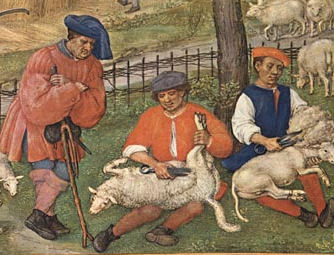 Juli, Brevarium Grimani, fol. 8v (Flemish)